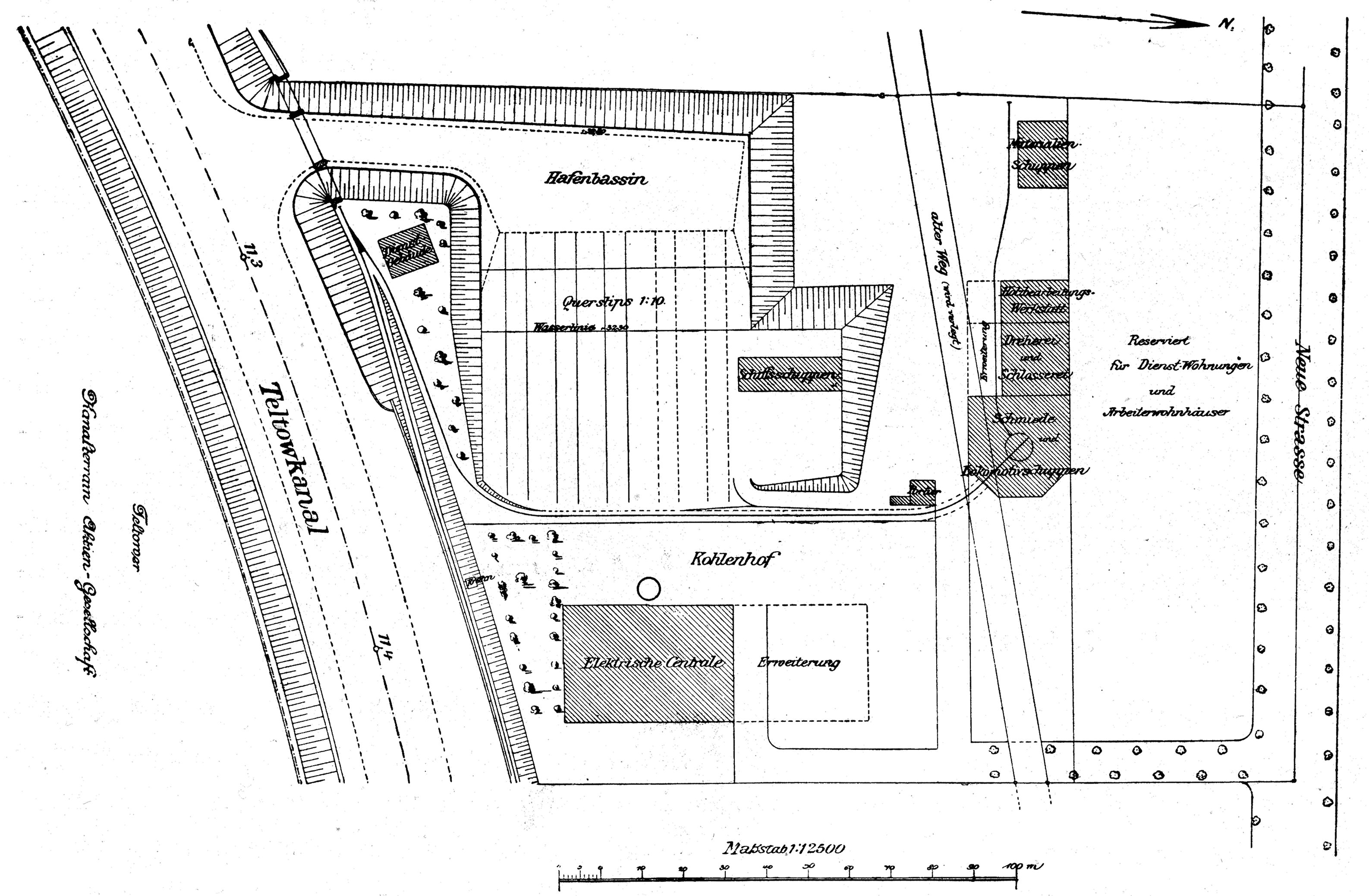 Lageplan des Bauhofs des Teltowkanals in Berlin-Zehlendorf